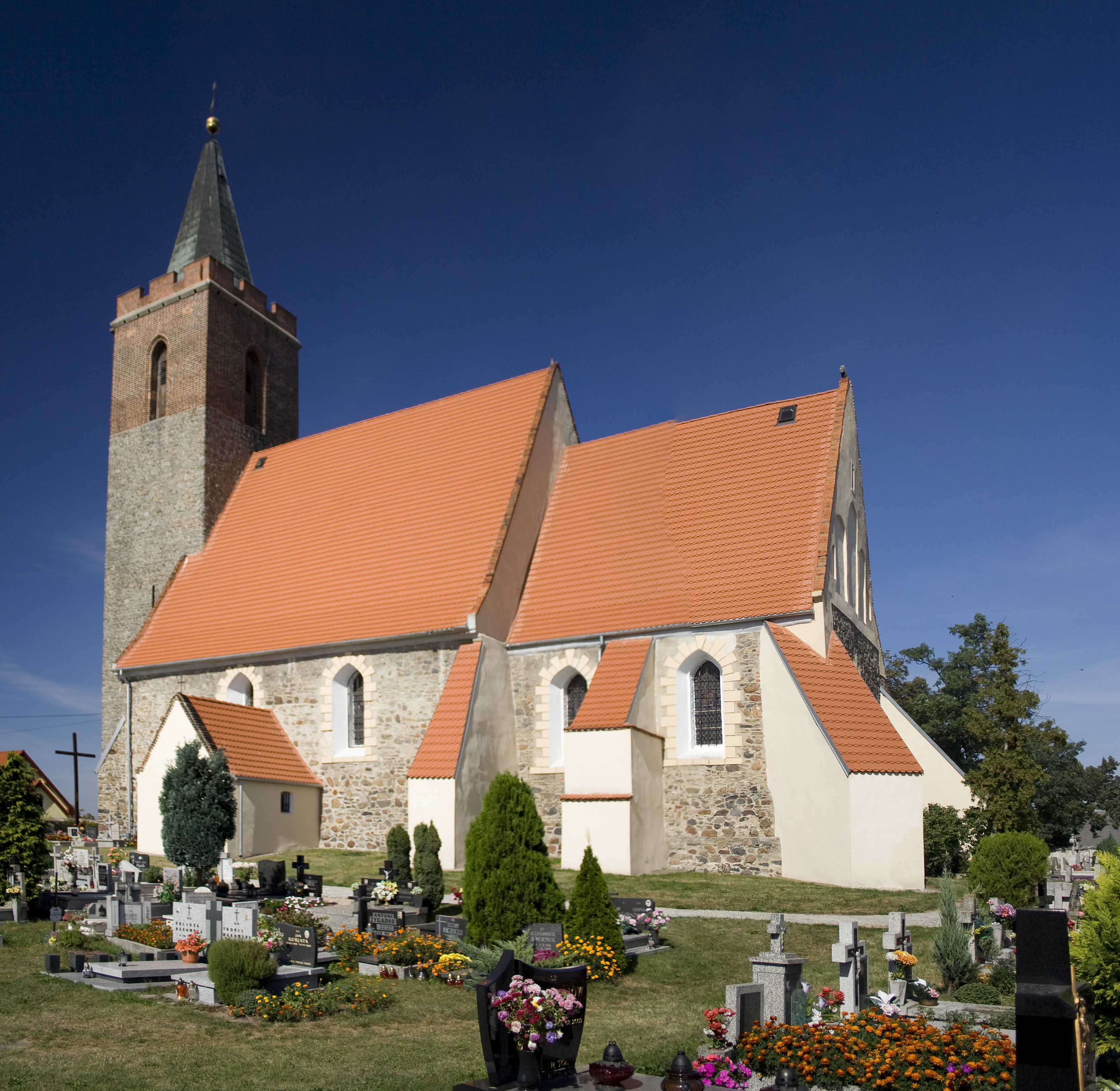 Turów - kościół rzymskokatolicki p.w. Narodzenia NMP, XV/XVI, pocz. XVII